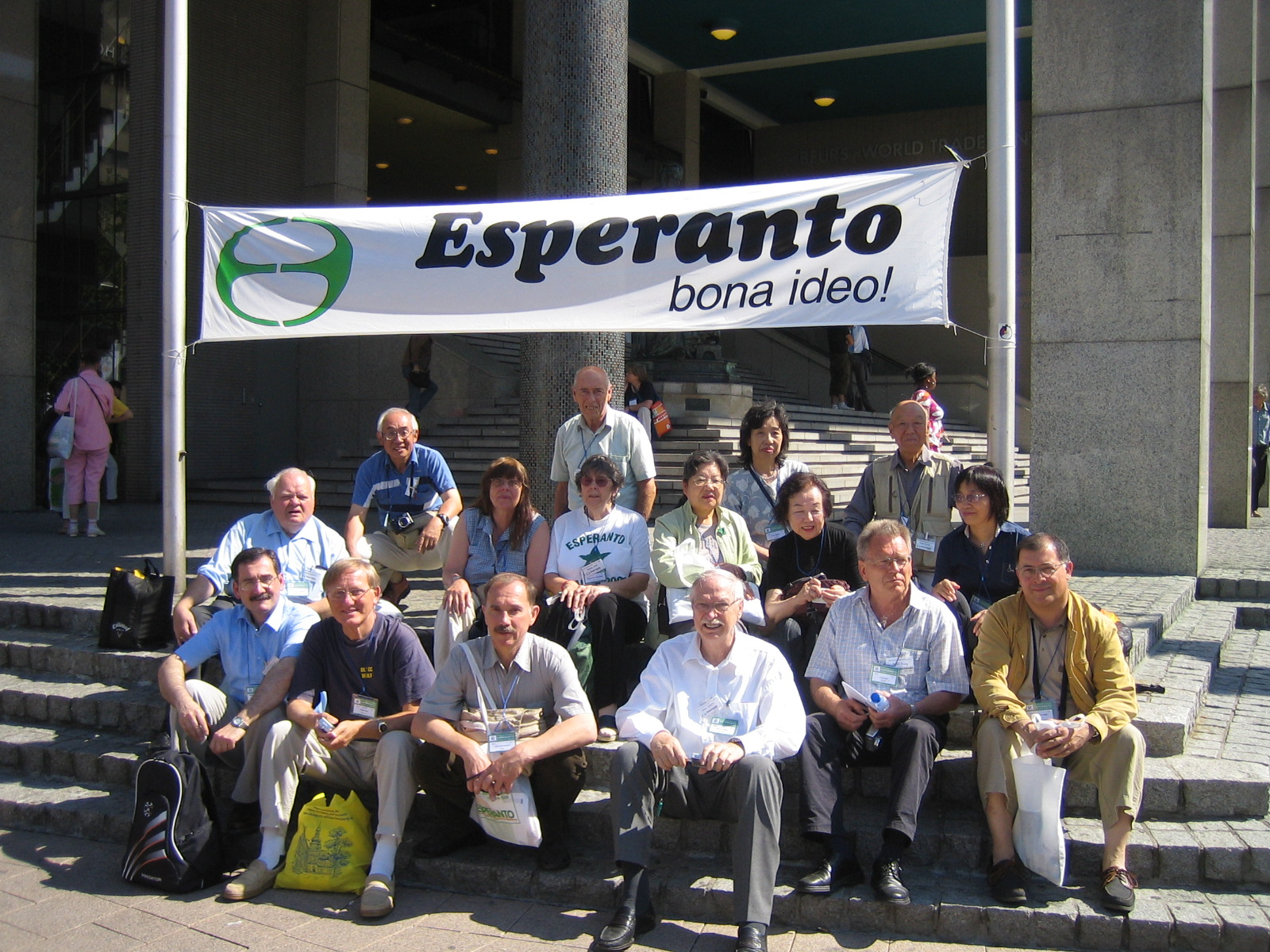 ILERA-anoj en la UK 2008 en Roterdamo.